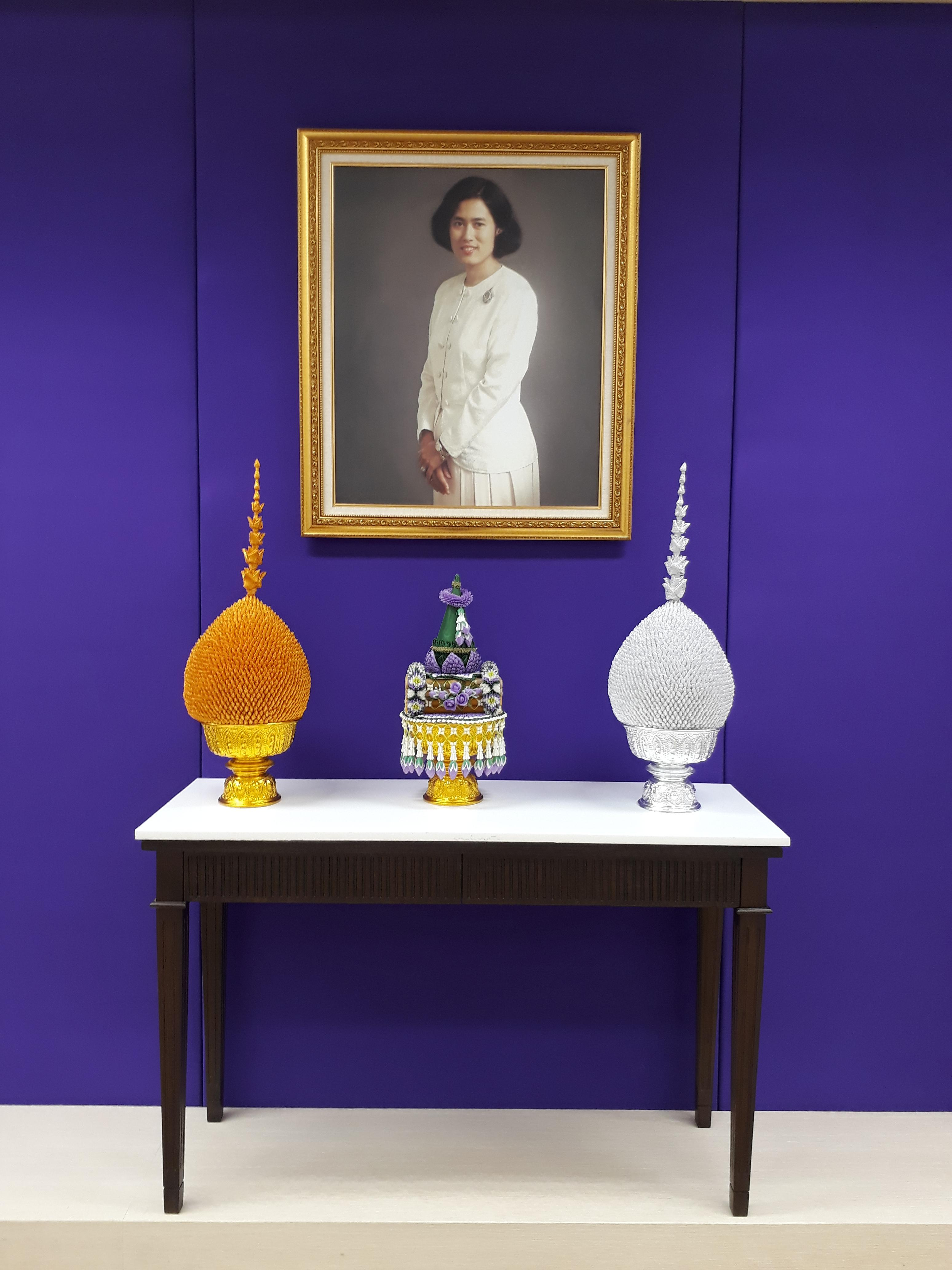 พระบรมฉายาลักษณ์ สมเด็จพระเทพรัตนราชสุดาฯ สยามบรมราชกุมารี